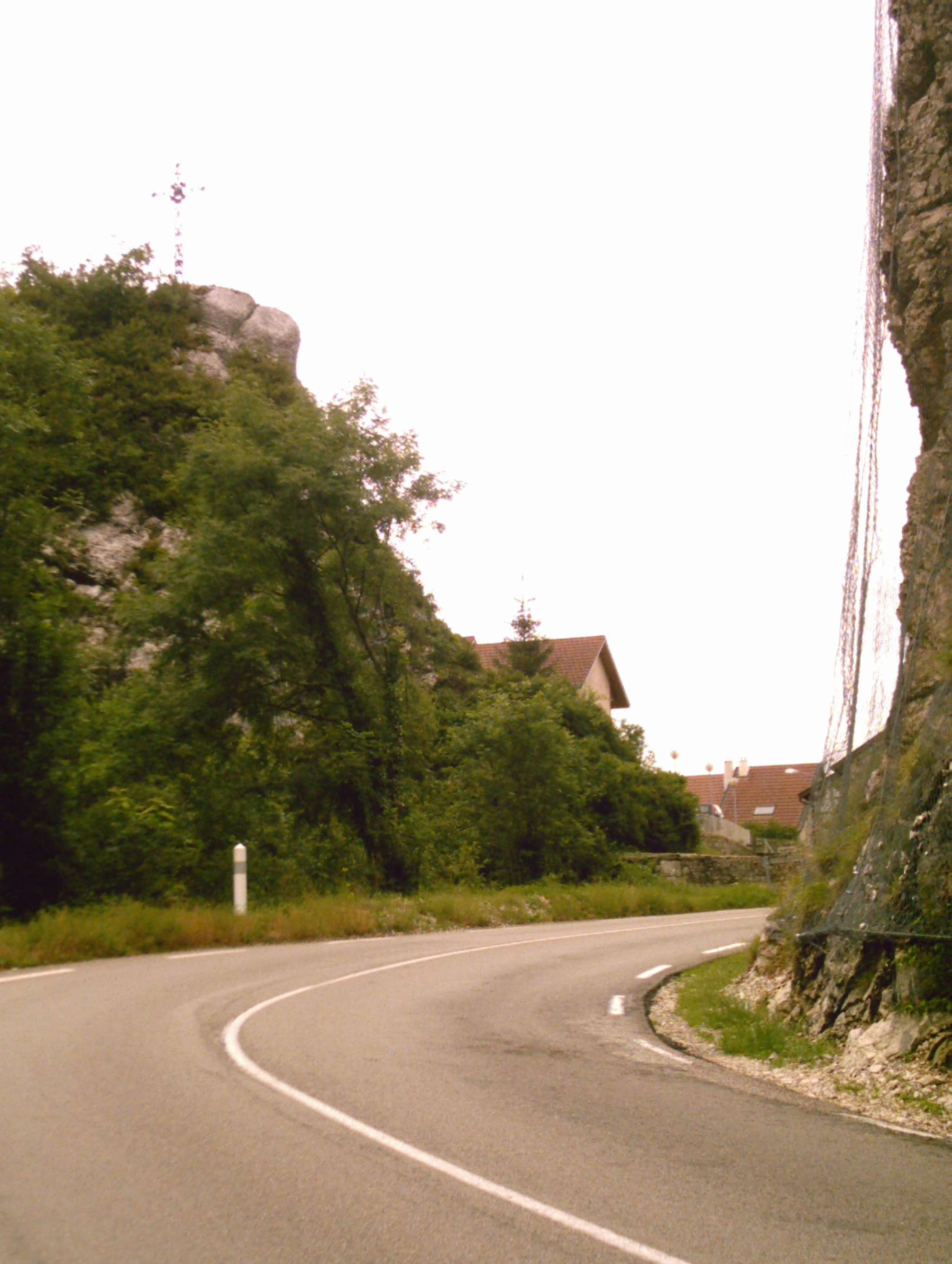 Le col de Matafelon (Ain, FRANCE)